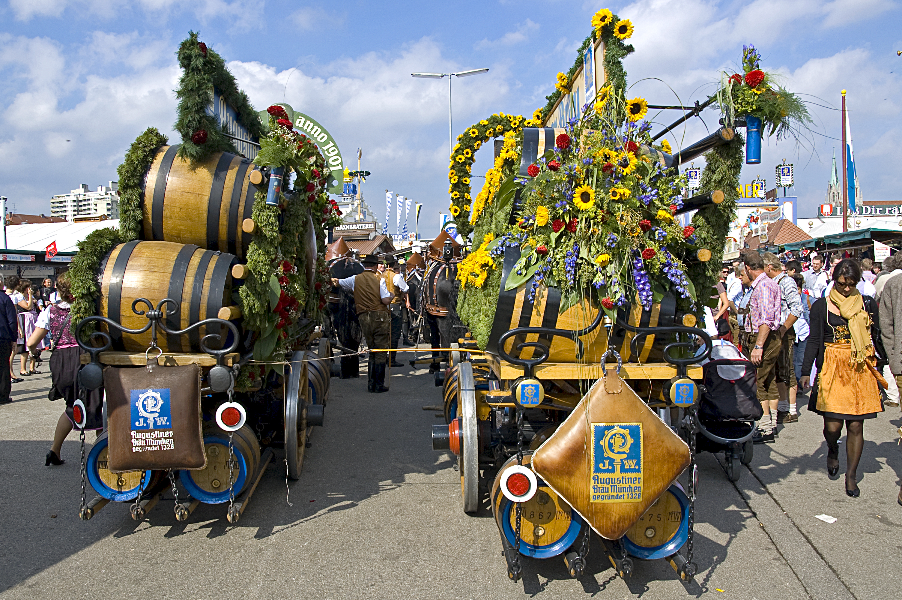 Oktoberfest 2011 ... auf Wiedersehen im Jahr 2012 ... ... Augustiner Bräu München ... das Pferdegespann einer der zwei Großbrauereien die noch im Münchener bzw. staatl. Besitz sind ... ansonsten ist alles in Händen der "InBev" u.a. ... ;-((